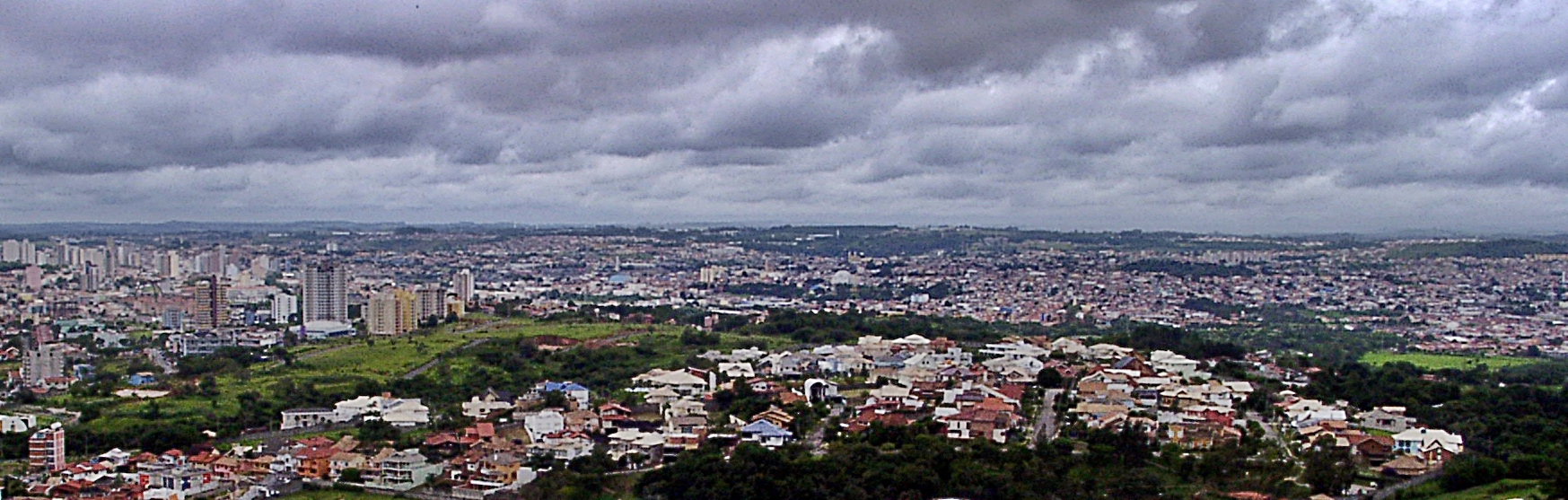 Vista de parte de Sorocaba num dia nublado, tirada enquanto estava hospedada no Transamerica Flat Hotel . Panorama of a part of Sorocaba in a cloudy day, taken while hosted at Transamerica Flat Hotel.